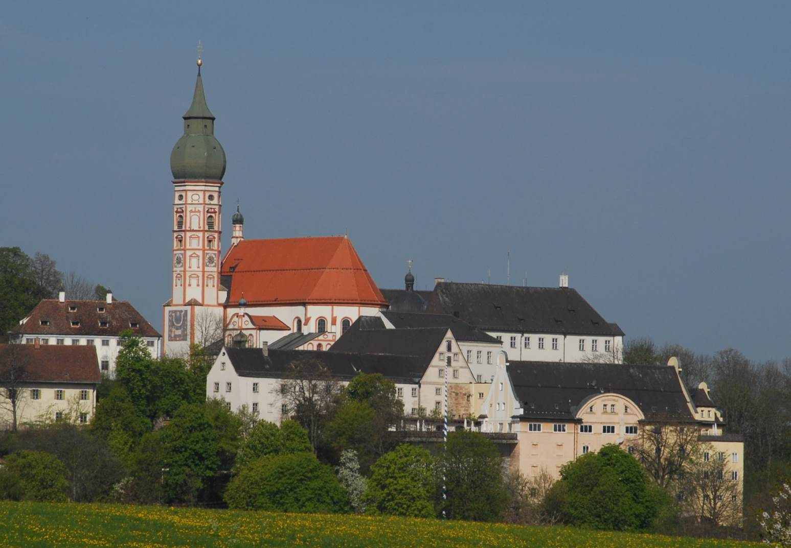 Kloster Andechs (monastery)